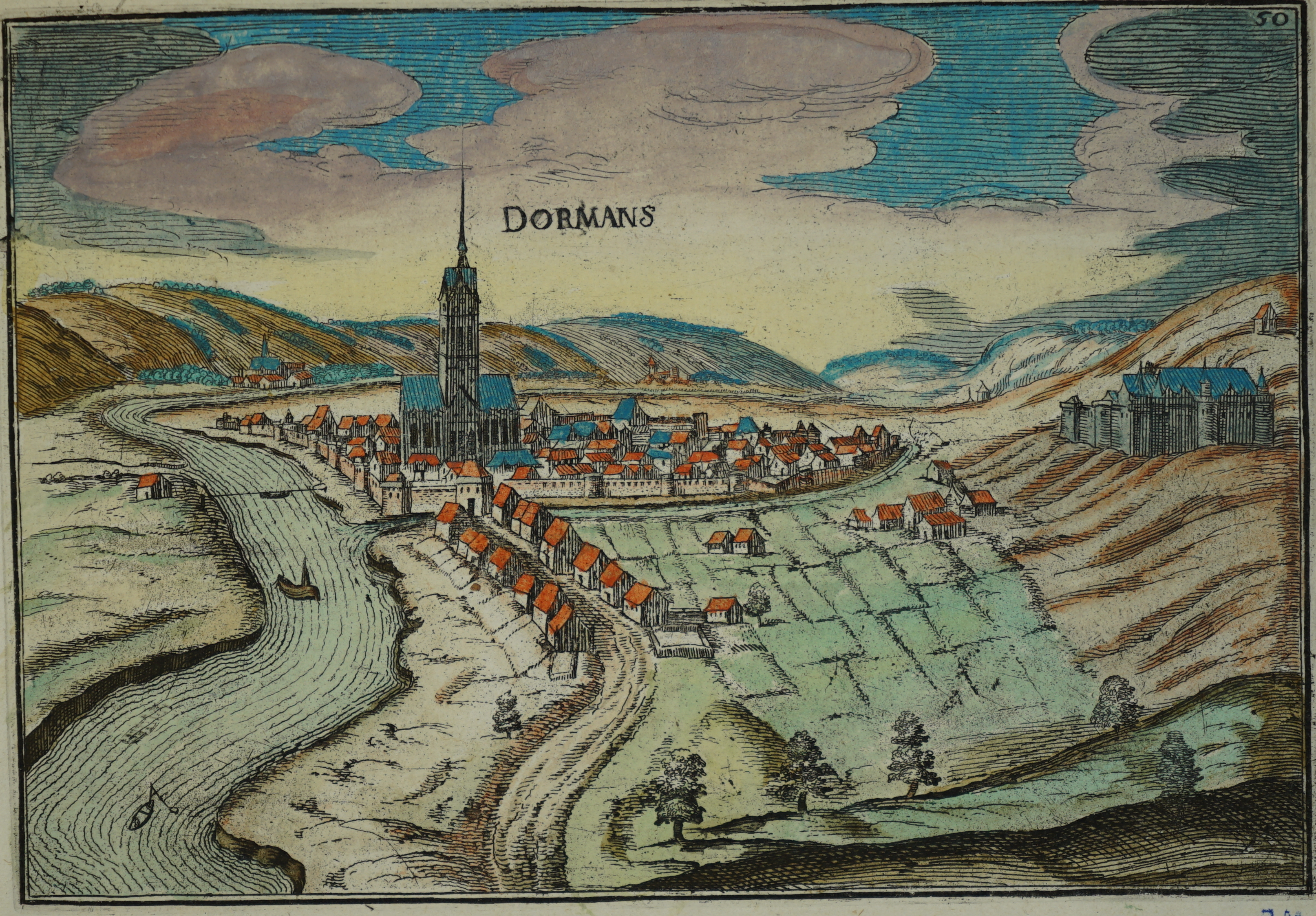 dessin provenant de plans et profils de toutes les principales villes et lieux considérables de France de C. Tassin.